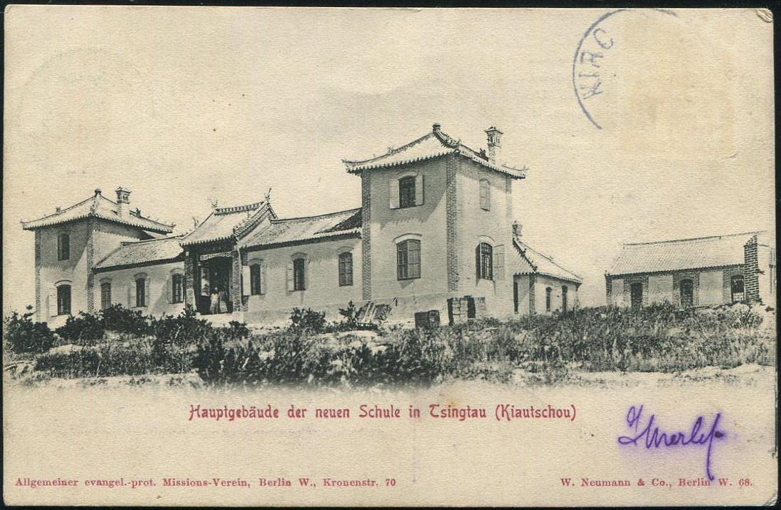 青岛礼贤书院教学楼